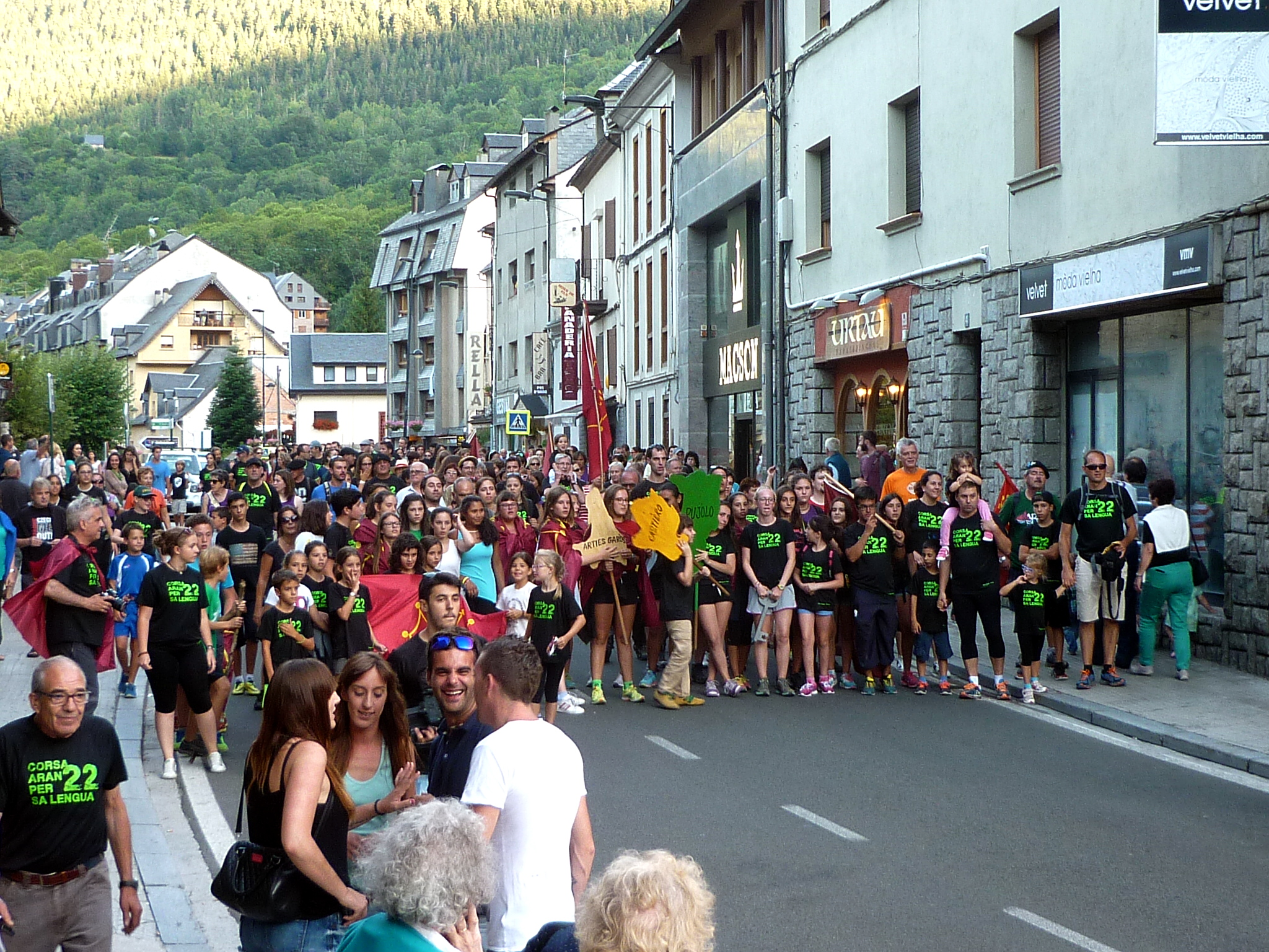 XXII-ena Corsa Aran per sa lengua: Grup de caminadors procedents de Montgarri. Porten la clau simbòlica i les siluetes retallades dels terçons d'Arties e Garòs, Castièro i Pujòlo. Els procedents de Les porten les siluetes dels altres terçons que, junts, formaran el mapa de la Val.